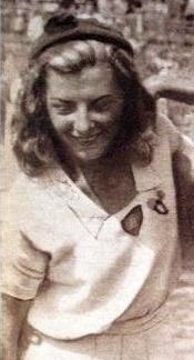 La plongeuse française Mady Moreau, championne d'Europe en septembre 1947, à dix-neuf ans.